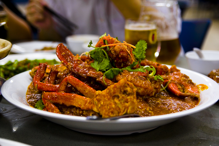 Chilli crab